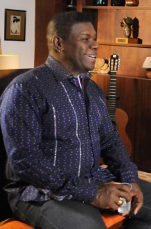 Cantor brasileiro Emílio Santiago em imagem do acervo da TV Brasil.